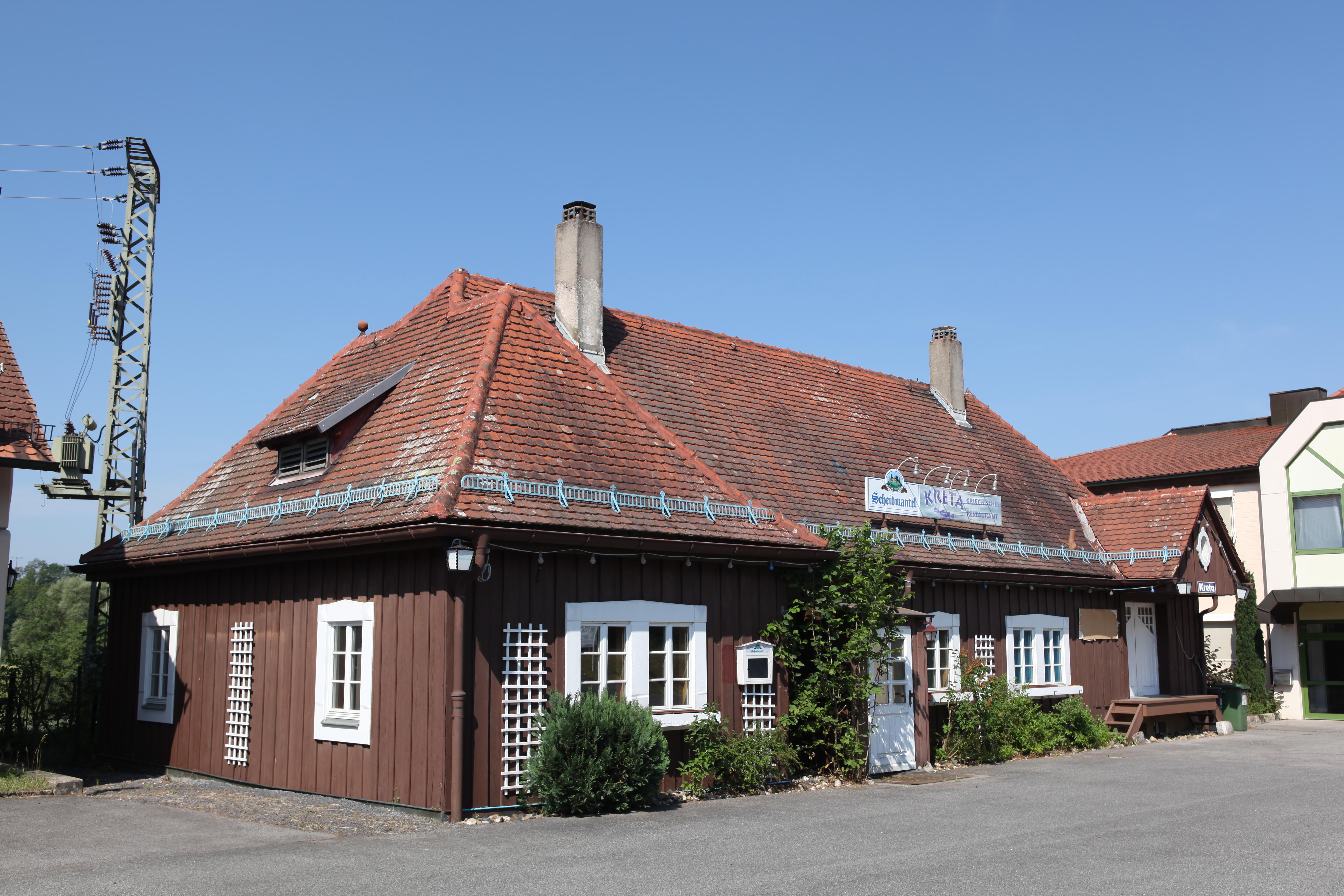 Ehemaliges Empfangsgebäude des Bahnhofs in Seßlach